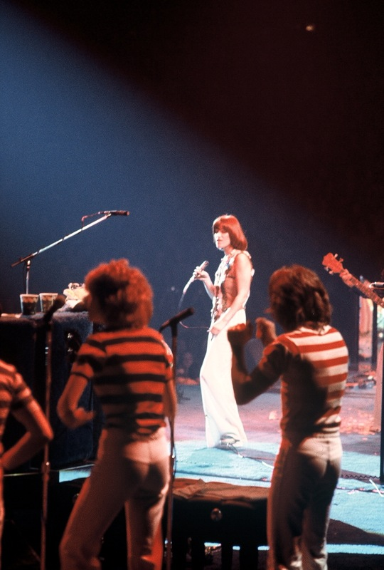 Kiki Dee in concert, 1975.